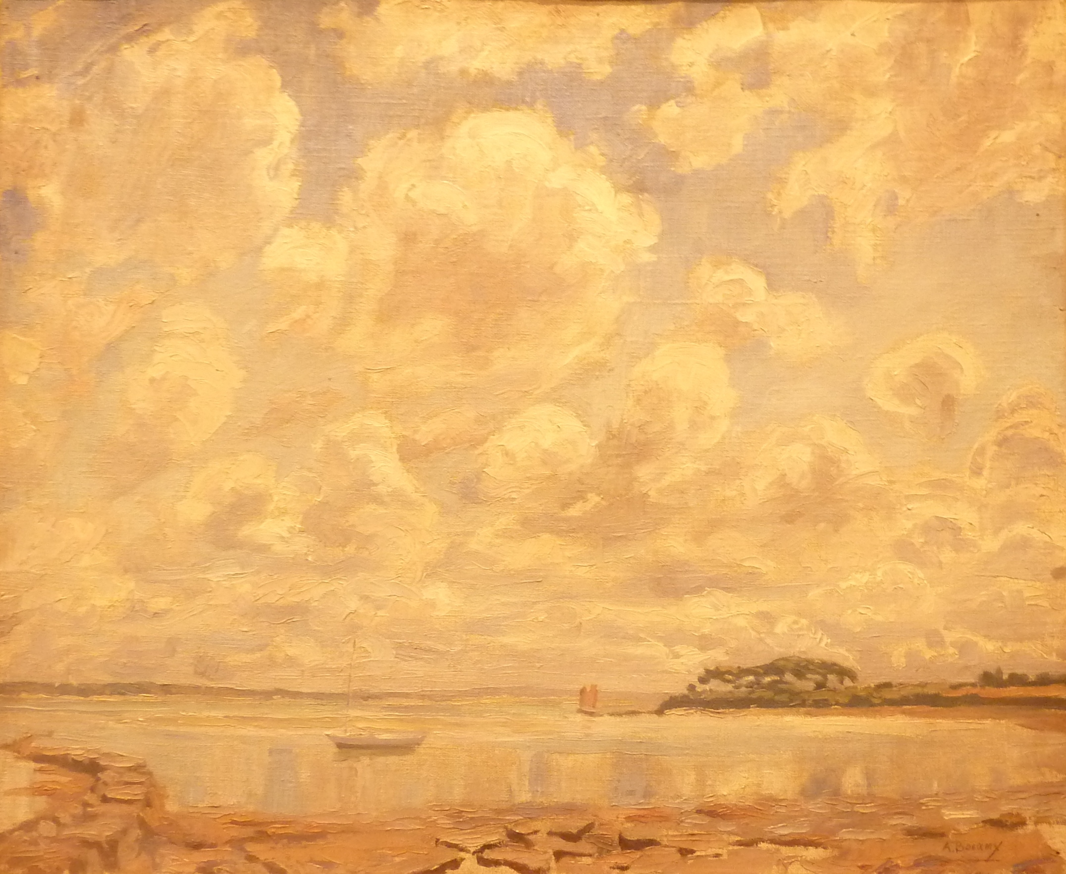 Armand-Joseph Bonamy : Le Bois de la chèvre. Île aux-Moines (non daté, huile sur toile, Conseil général du Morbihan, Musée des beaux-arts de Vannes)